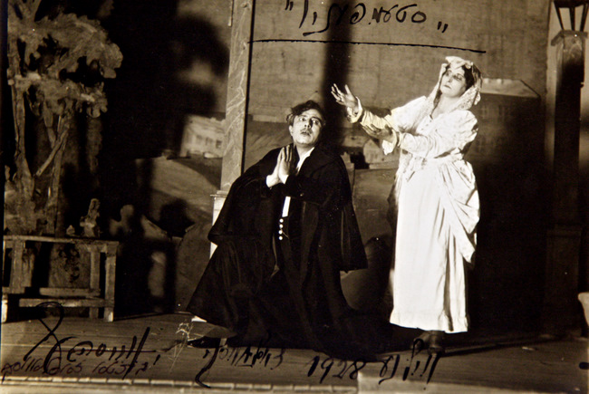 Scene from Stempenyu Vilna 1928 YIVO